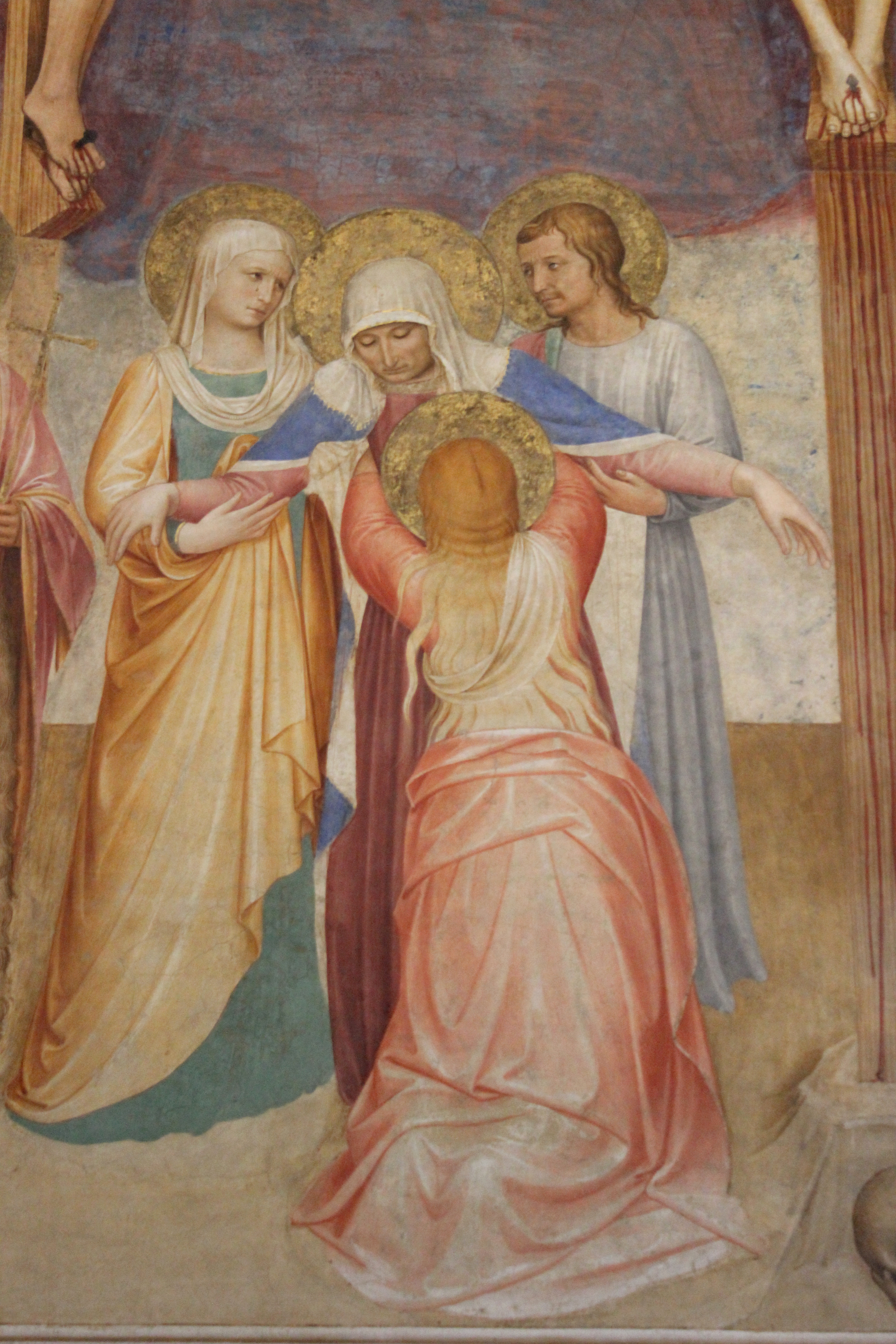 Florencia, San Marco. Crucifixión con santos por fra Angelico.